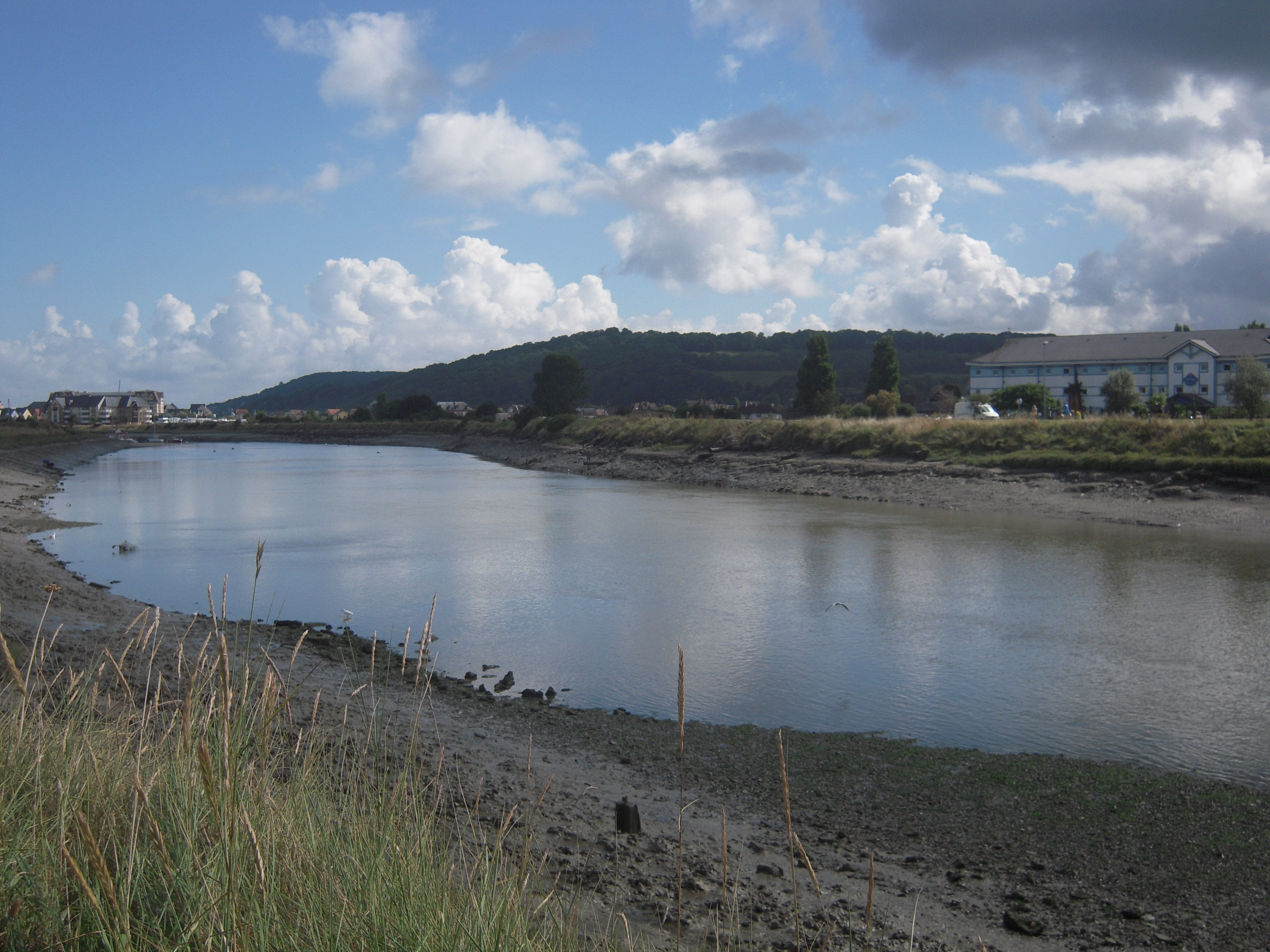 La Dives à Cabourg